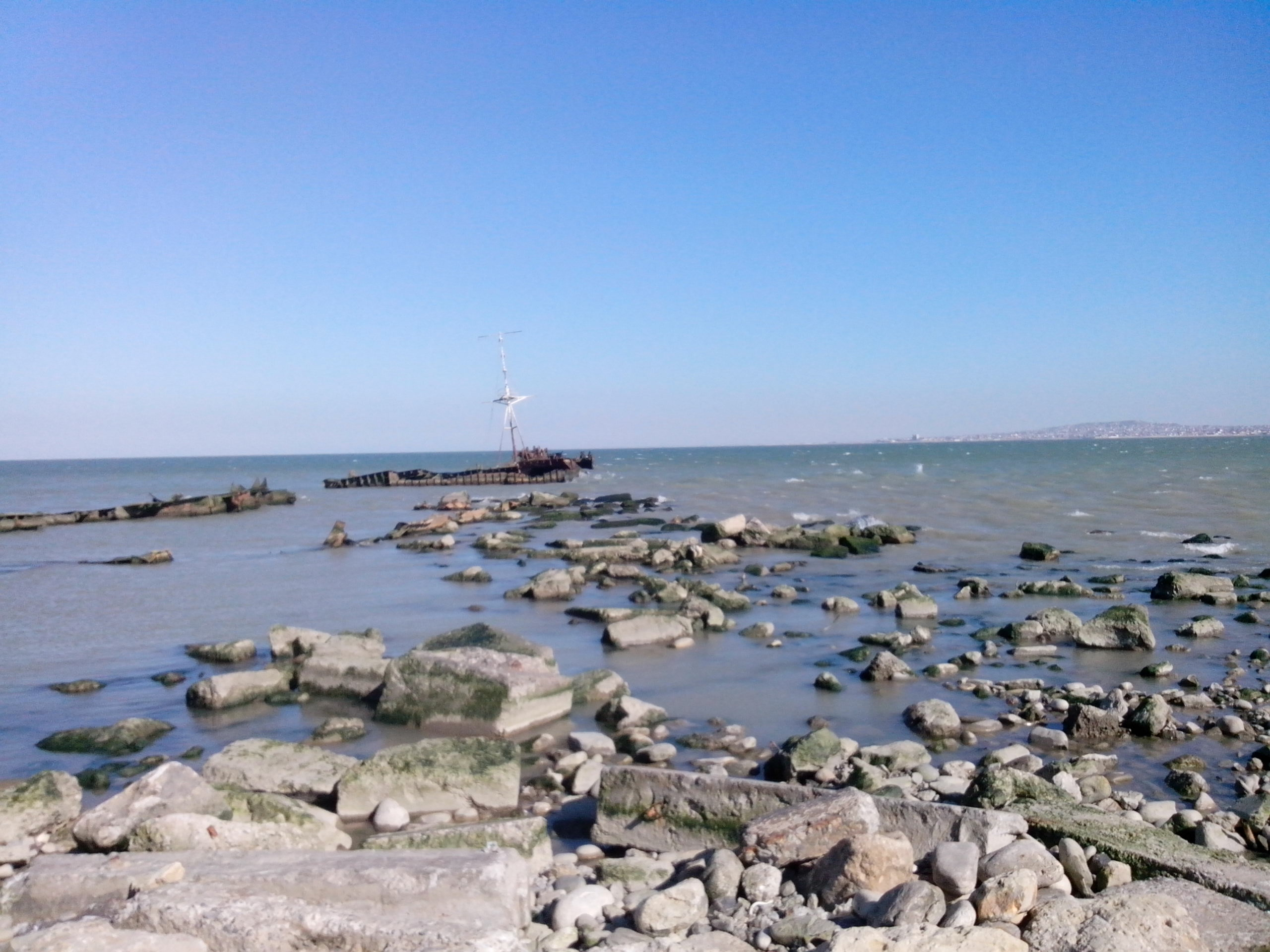 Bolşevik Nərimanov gəmisinin qalıqları